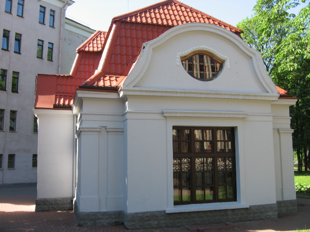 Минск, туалет в Александровском сквере